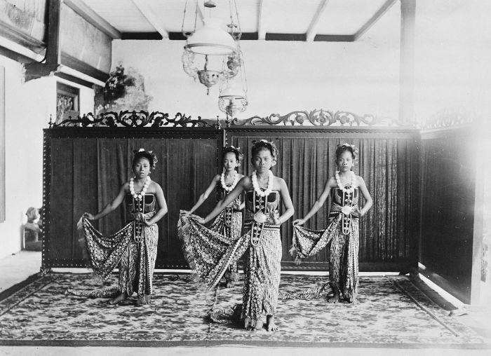 Foto. Danseressen aan het hof van de Susuhunan van Solo, Soerakarta